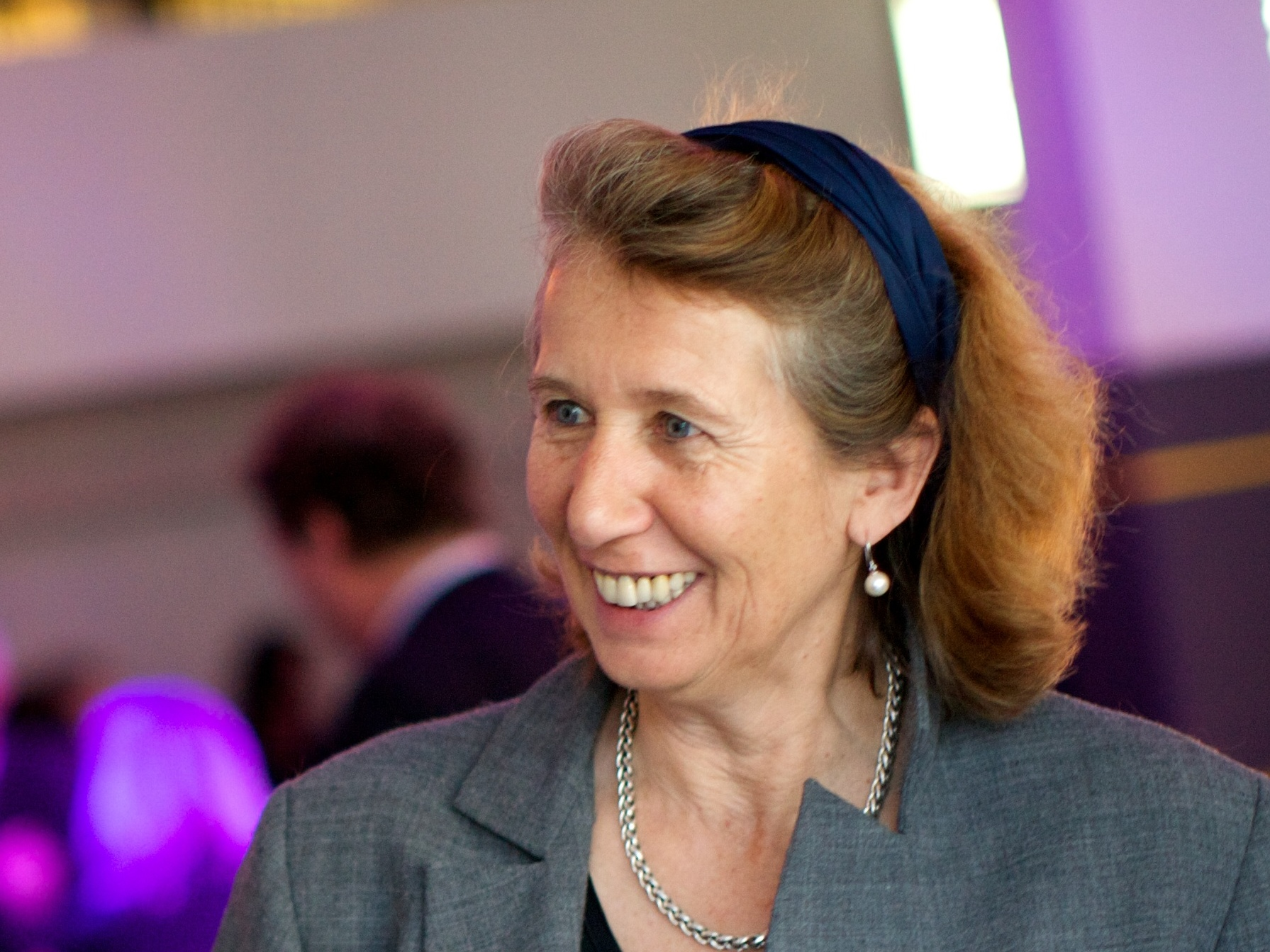 Op donderdag 6 maart overhandigde Caroline Nevejan, vicevoorzitter Raad voor Cultuur, het advies Meedoen is de kunst - over voorzieningen voor actieve cultuurparticipatie - aan minister Bussemaker (OCW) en Arno Brok (VNG) in het HipHopHuis in Rotterdam.